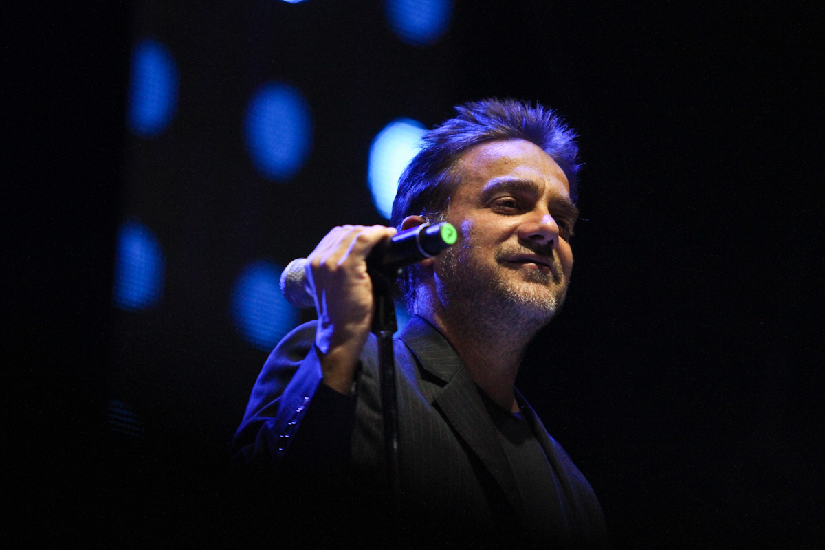 Vicentico en Antofagasta, Chile, 2012.